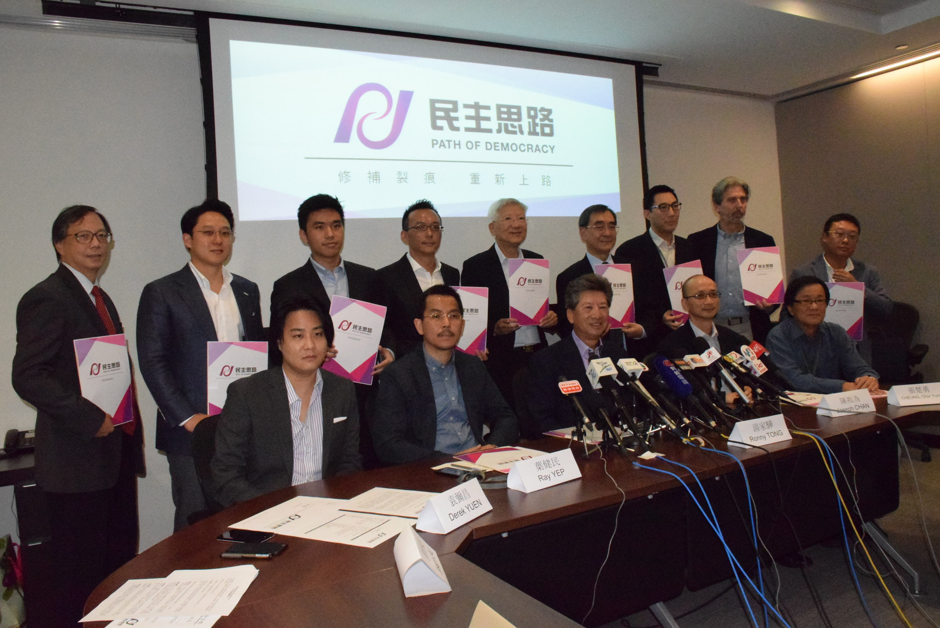 香港泛民立法會議員湯家驊牽頭成立新智庫，希望在泛民與建制之間尋找新出路。(美國之音湯惠芸攝 )